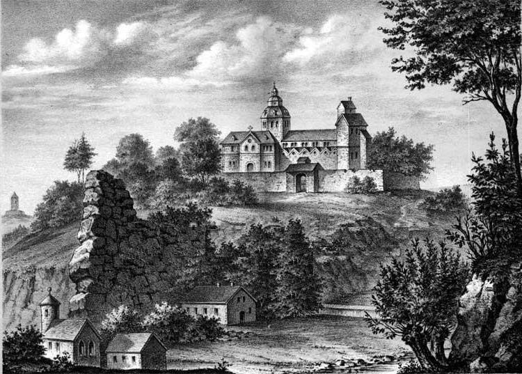 Goslar, Petersberg mit dem 1527 zerstörten St.-Peters-Stift, historischer Stich (im Mittelbereich Schriftzug retuschiert)